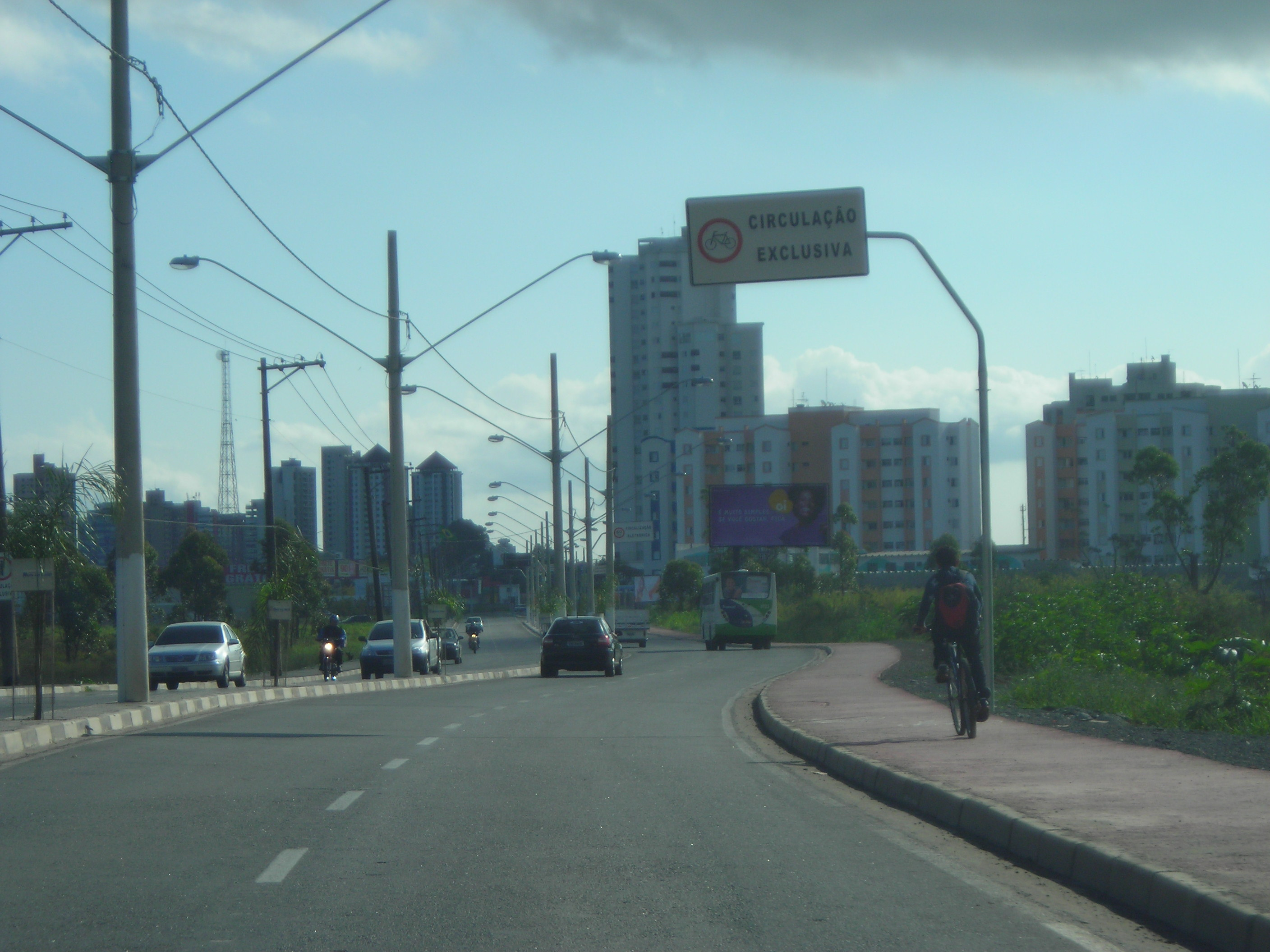 Avenida Francisco Rodrigues Filho, trecho urbano da Rodovia Mogi-Guararema (SP-66), com a cidade de Mogi das Cruzes ao fundo.